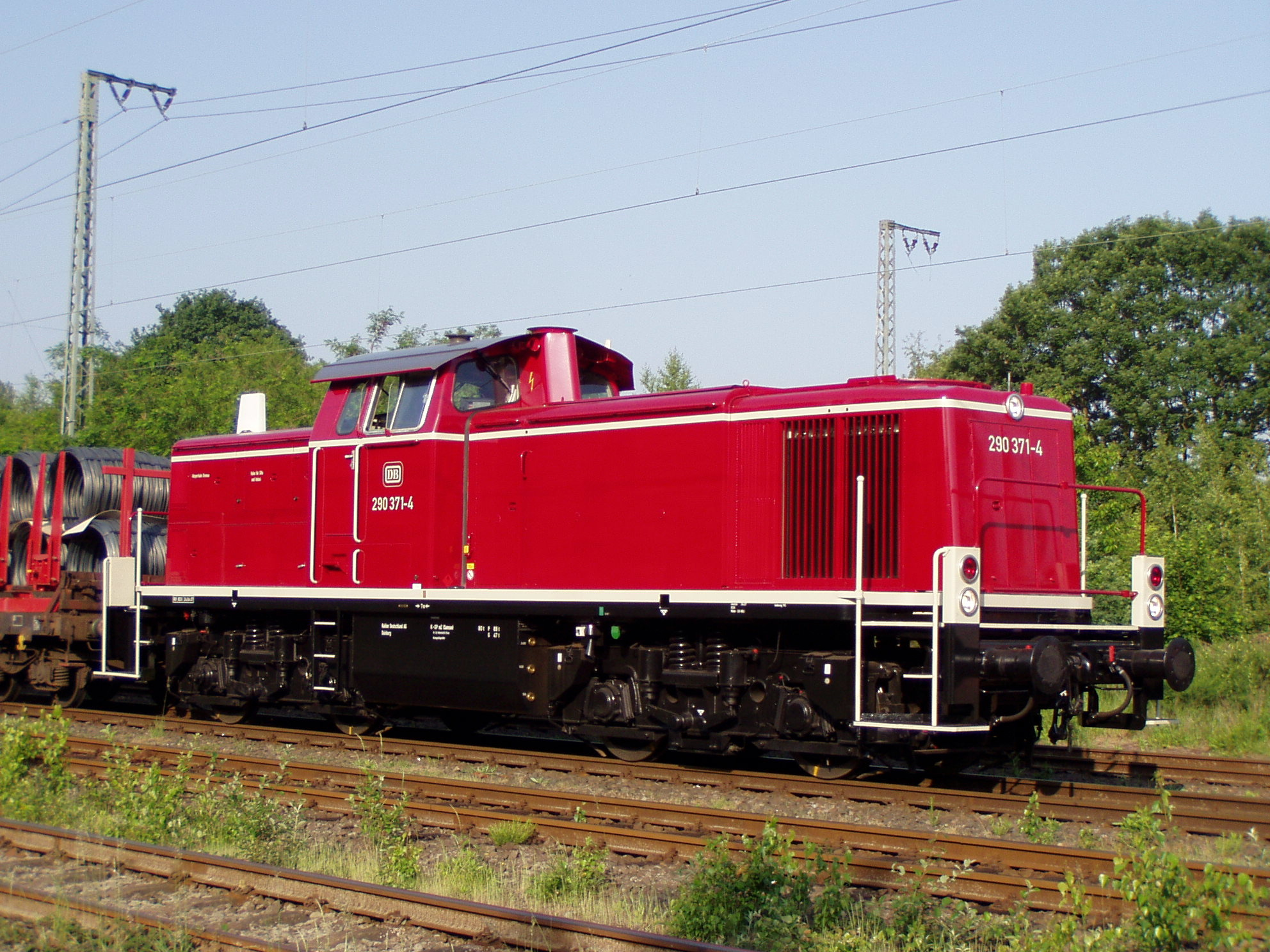 BR 290 371 beim Rangieren